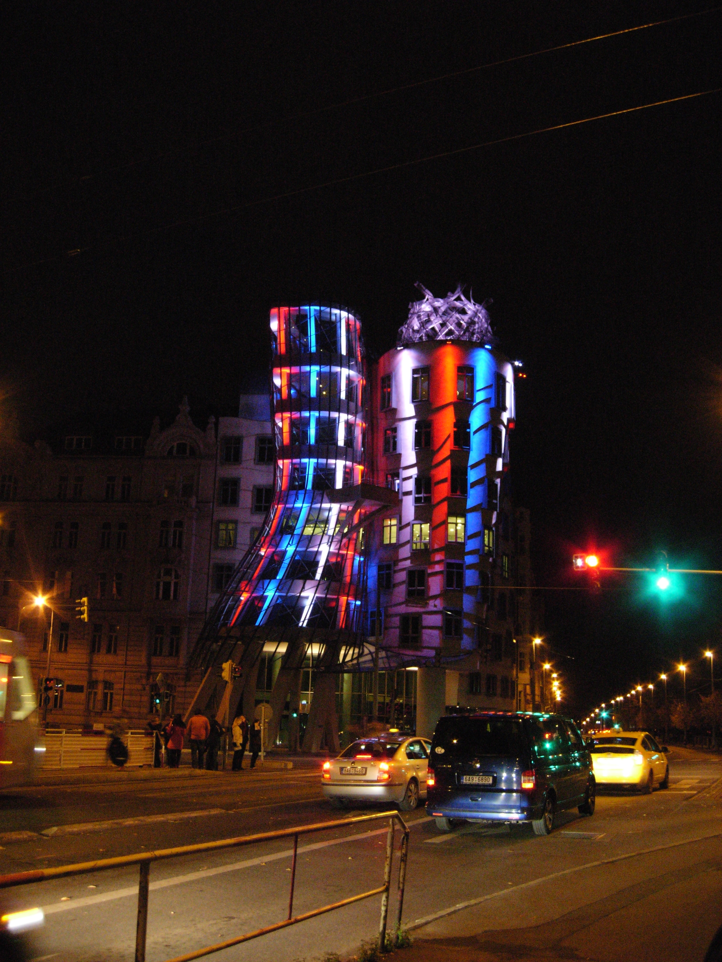 Instalace Tančící dům - světlo je pohyb, světlo je klid od Jaroslava Smetany a Filipa Müllera v rámci festivalu světla Signal.